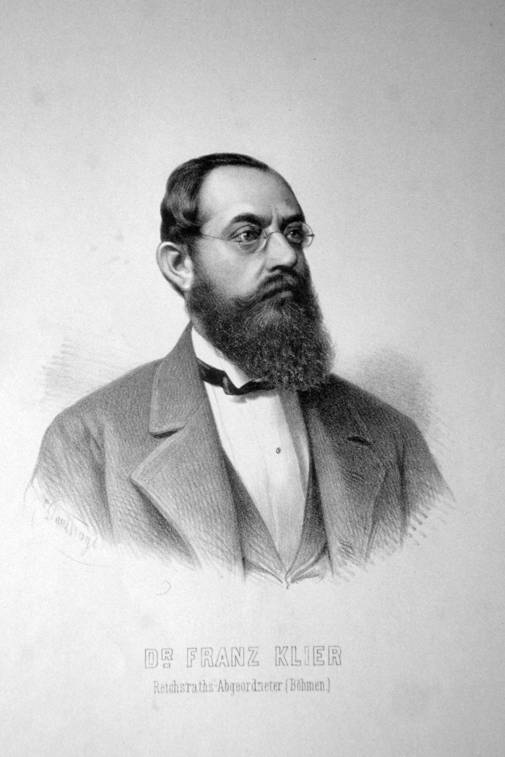 Dr. Franz Klier (1819-1884), österreichischer Ökonom, Politiker, Abgeordneter zum Reichsrat für Böhmen. Lithographie von Adolf Dauthage, 1861.